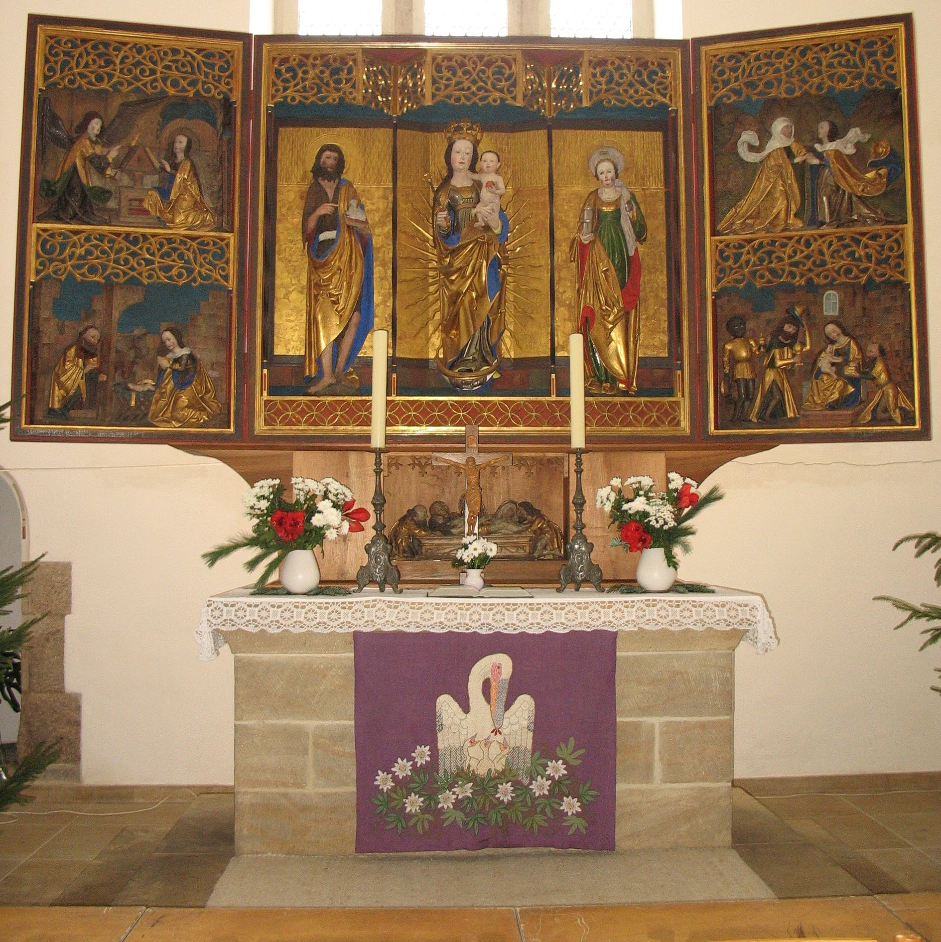 Plauen, St. Johanniskirche: Altar